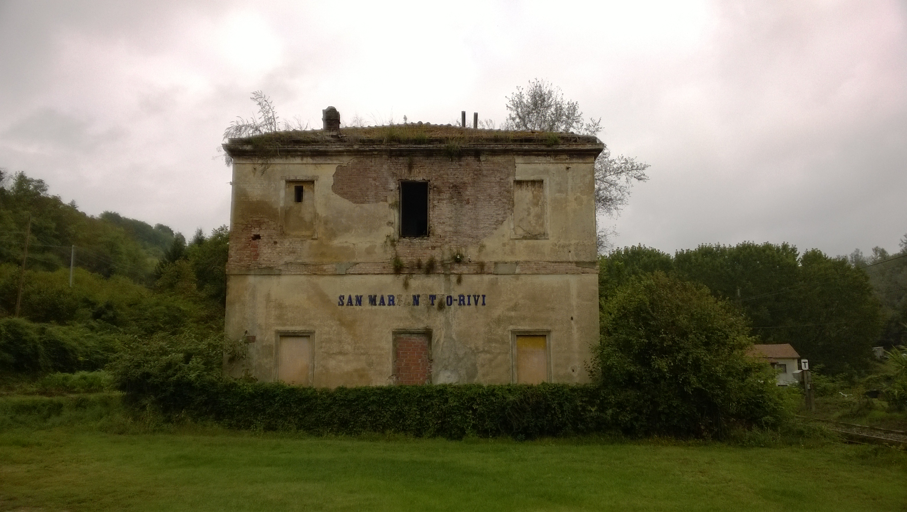 La stazione abbandonata di San Marzanotto Rivi (Asti, Italia) lungo la ferrovia Asti-Genova.